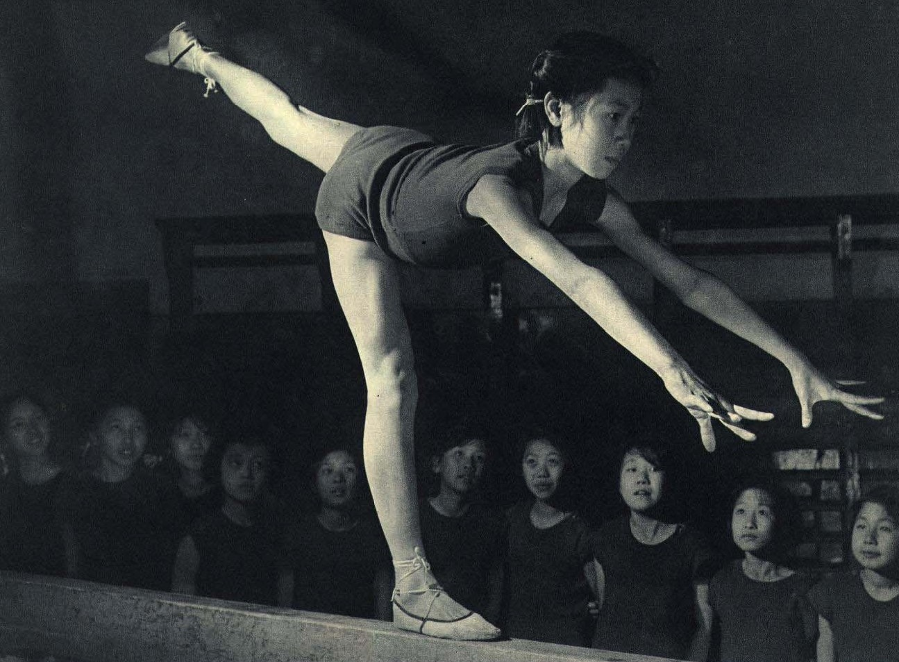 1962-01 1962年 体操平衡木2